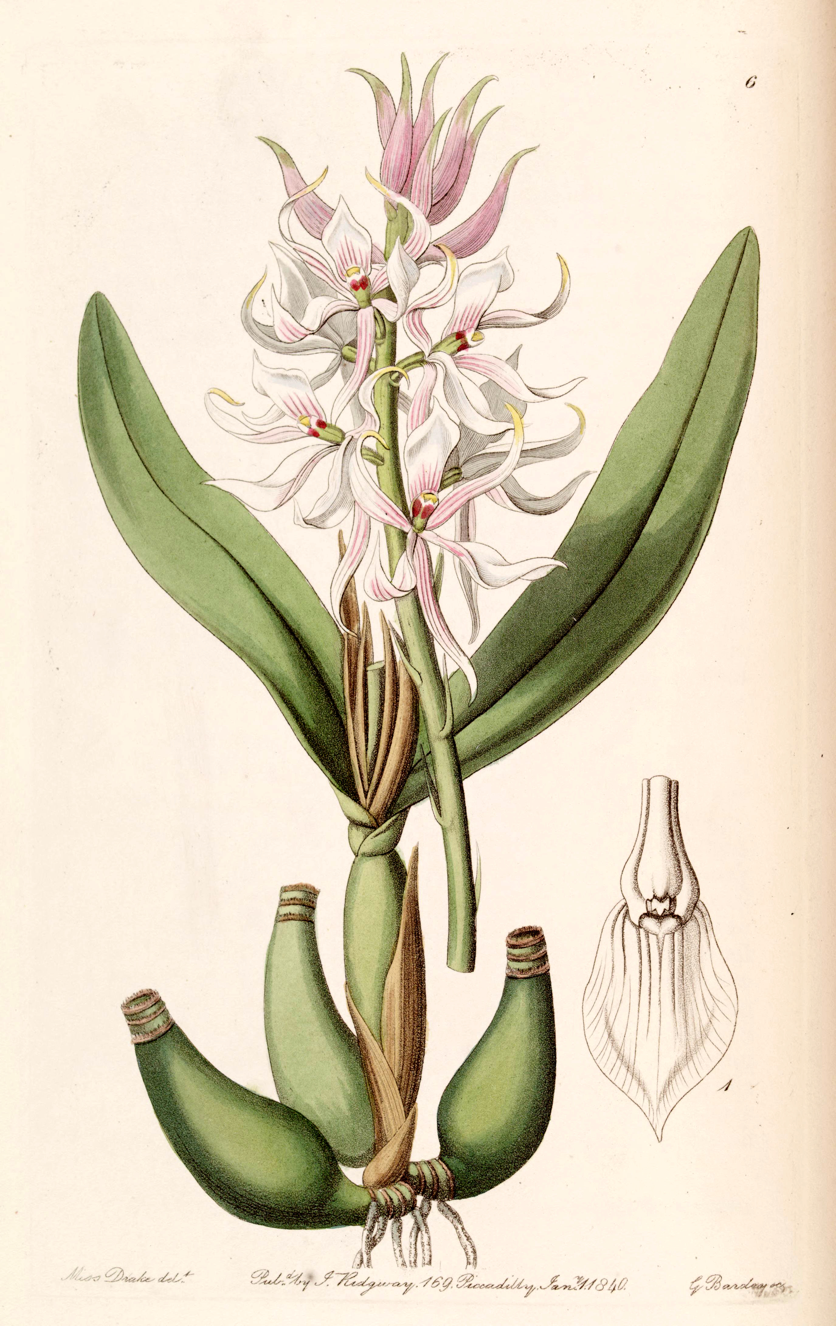 Prosthechea glumacea (as syn. Epidendrum glumaceum)